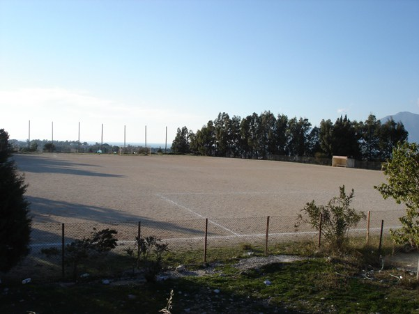 Kastritsi Groud Patra Greece Γήπεδο Καστριτσίου , Πάτρα